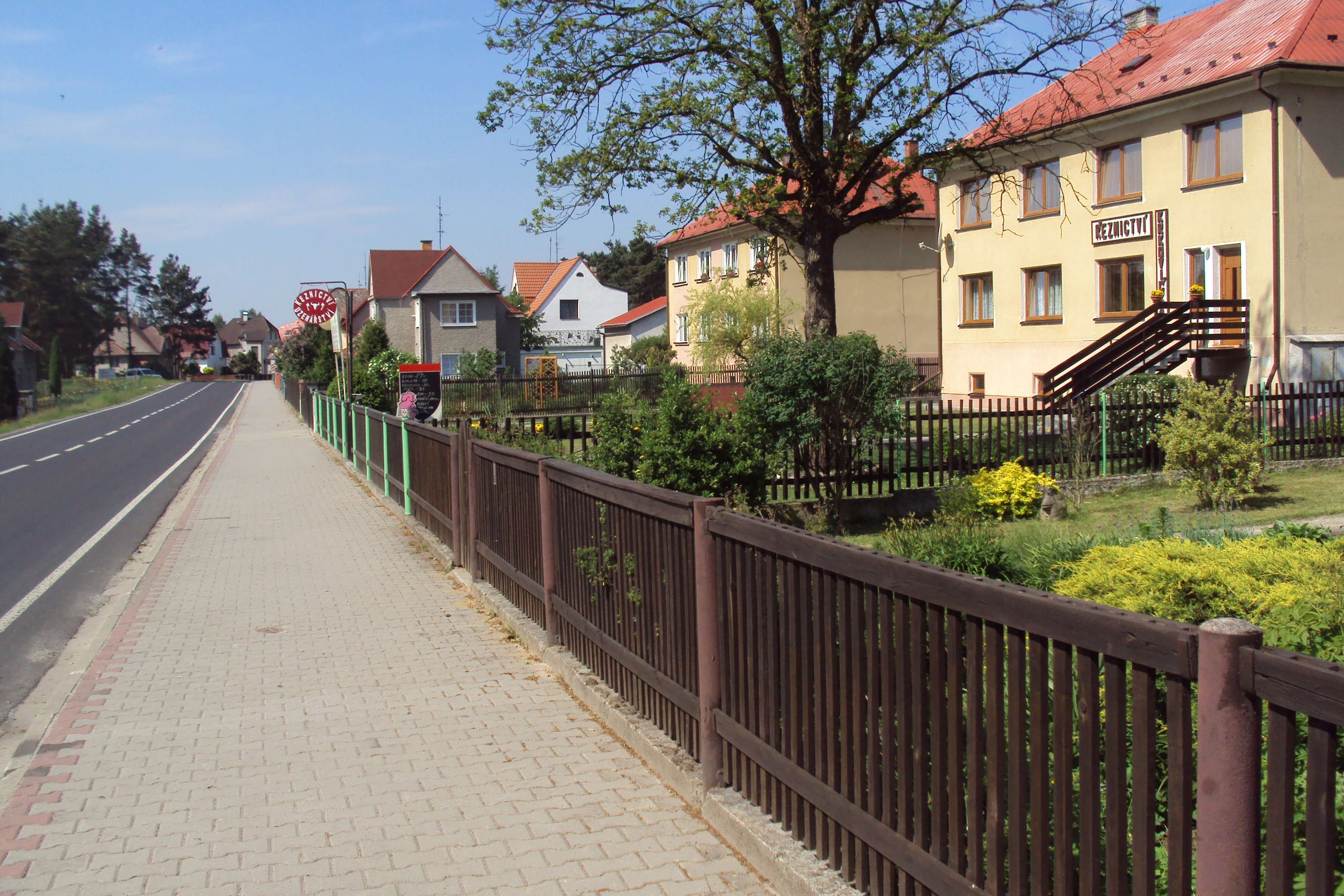 Hlavní ulice v Provodíně kolem školy, obecního úřadu